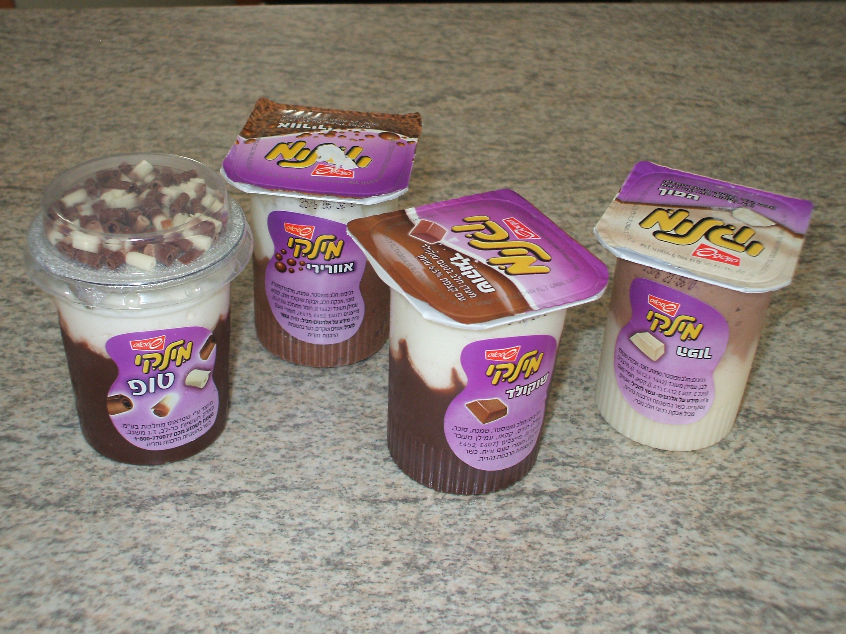 "Milky", an Israeli pudding dessert